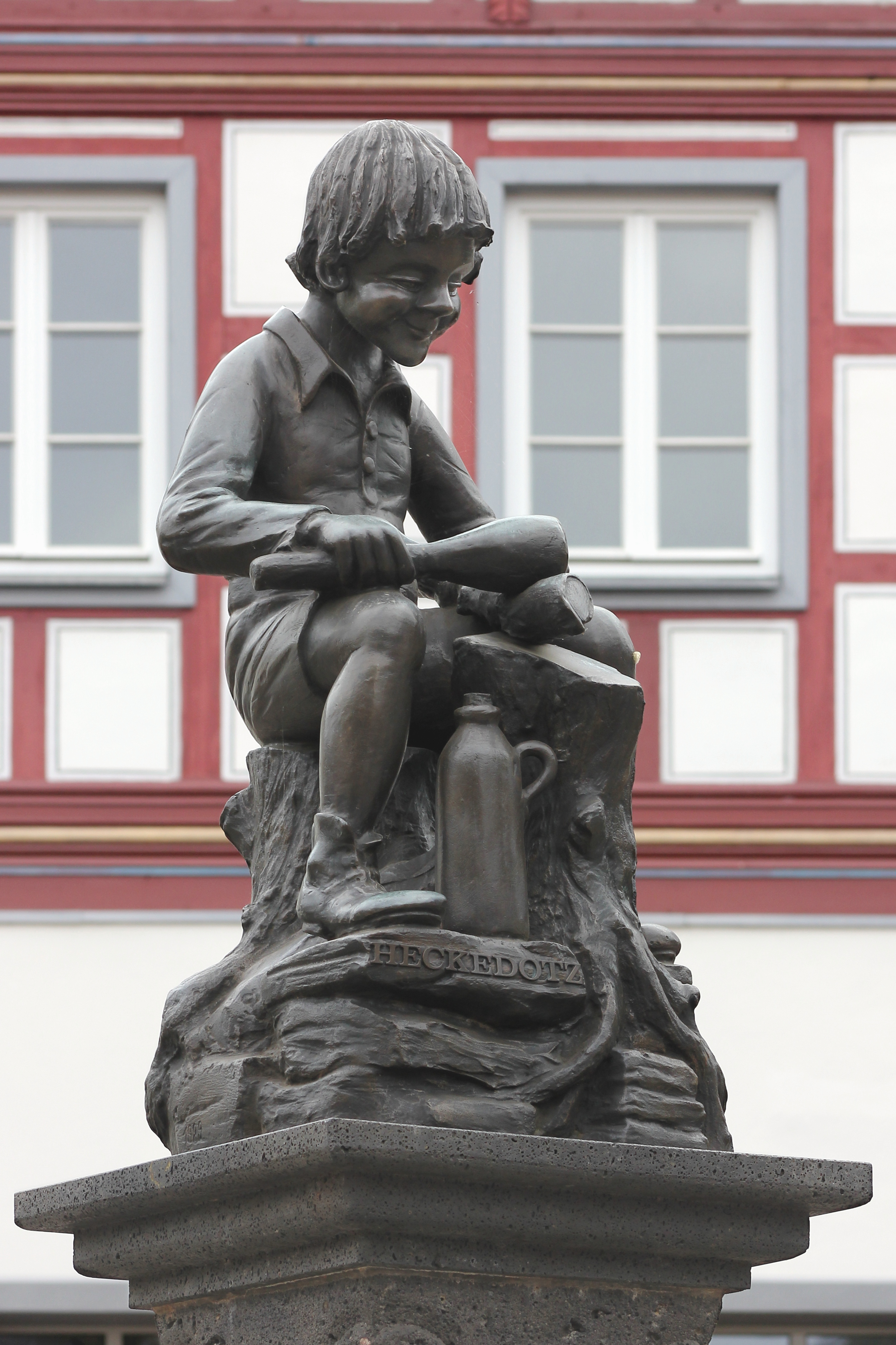 Bronzeskulptur auf dem Heckedotzbrunnen in Treis-Karden am Marktplatz. Der Heckedotz ist ein kleiner schelmischer Junge. Hier ist er damit beschäftigt, mit einem Holzschlägel die Lohe bzw. Rinde von einem Eichenast zu lösen. Die Skulptur ist ein Werk des Koblenzer Bildhauers Fritz Berlin. Am 11. November 1989 wurde sie auf den bereits am 30. April 1989 eingeweihten Brunnen gesetzt. Die Basaltreliefs am Brunnen schuf Gerhard Zenzen aus Ulmen nach Vorlagen von Heinrich Sausen aus Treis.